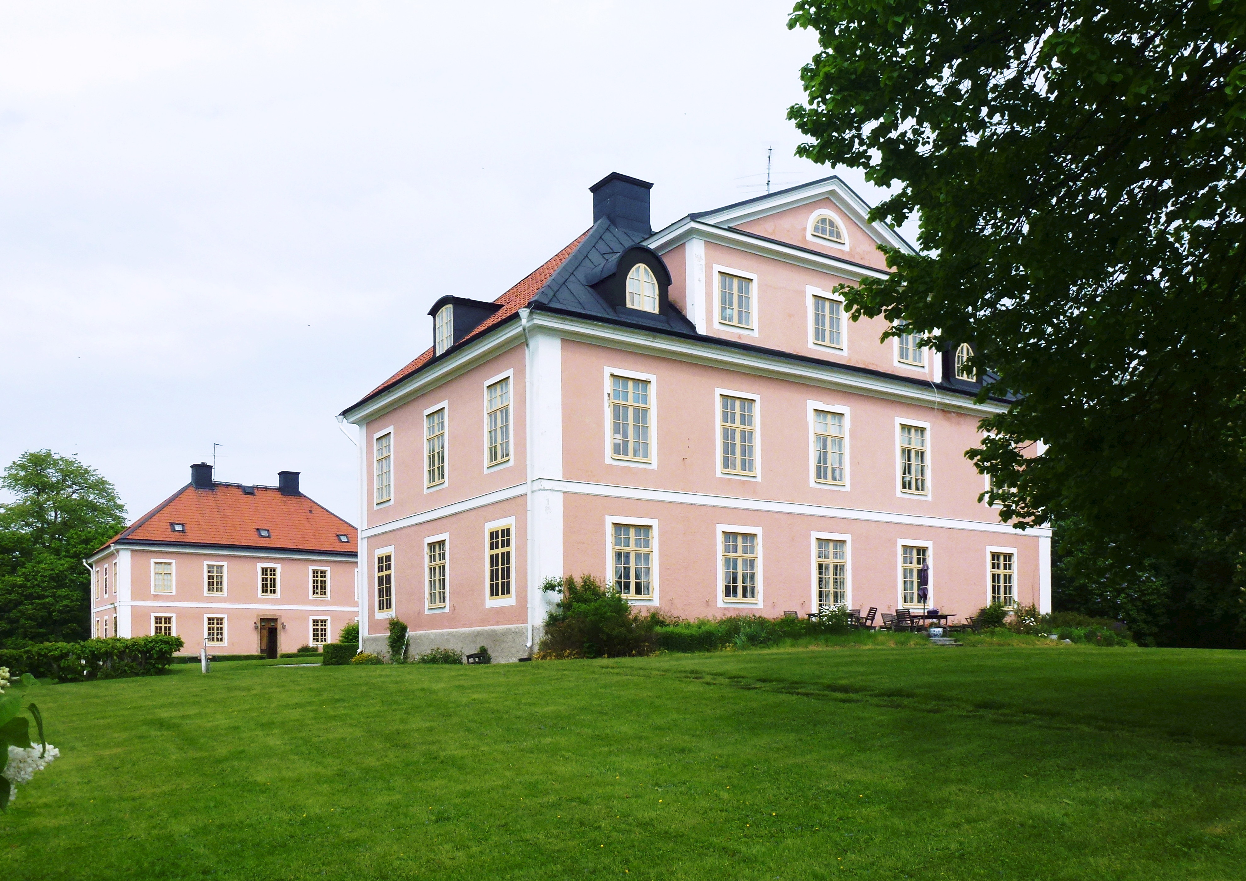 Fållnäs gård, Nynäshamns kommun, norra och södra flygeln (huvudbyggnaden närmast)